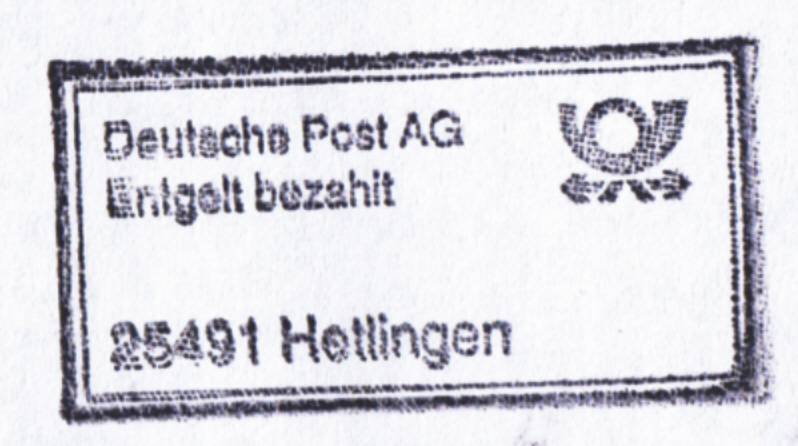 Infopoststempel der Deutschen Post AG